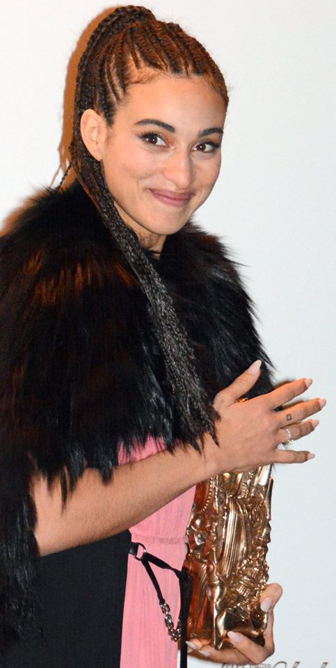 Camelia Jordana à la cérémonie des César du cinéma